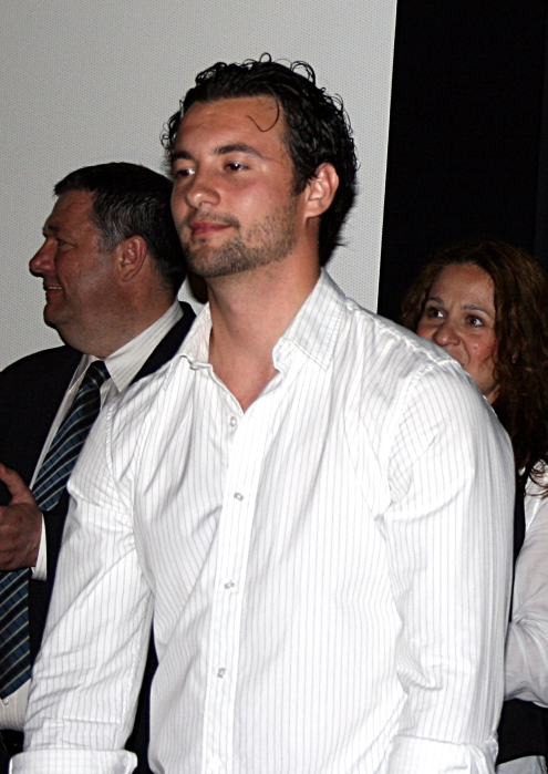 Premijera filma "Nije kraj" u Zagrebu, glavni glumac filma Ivan Herceg